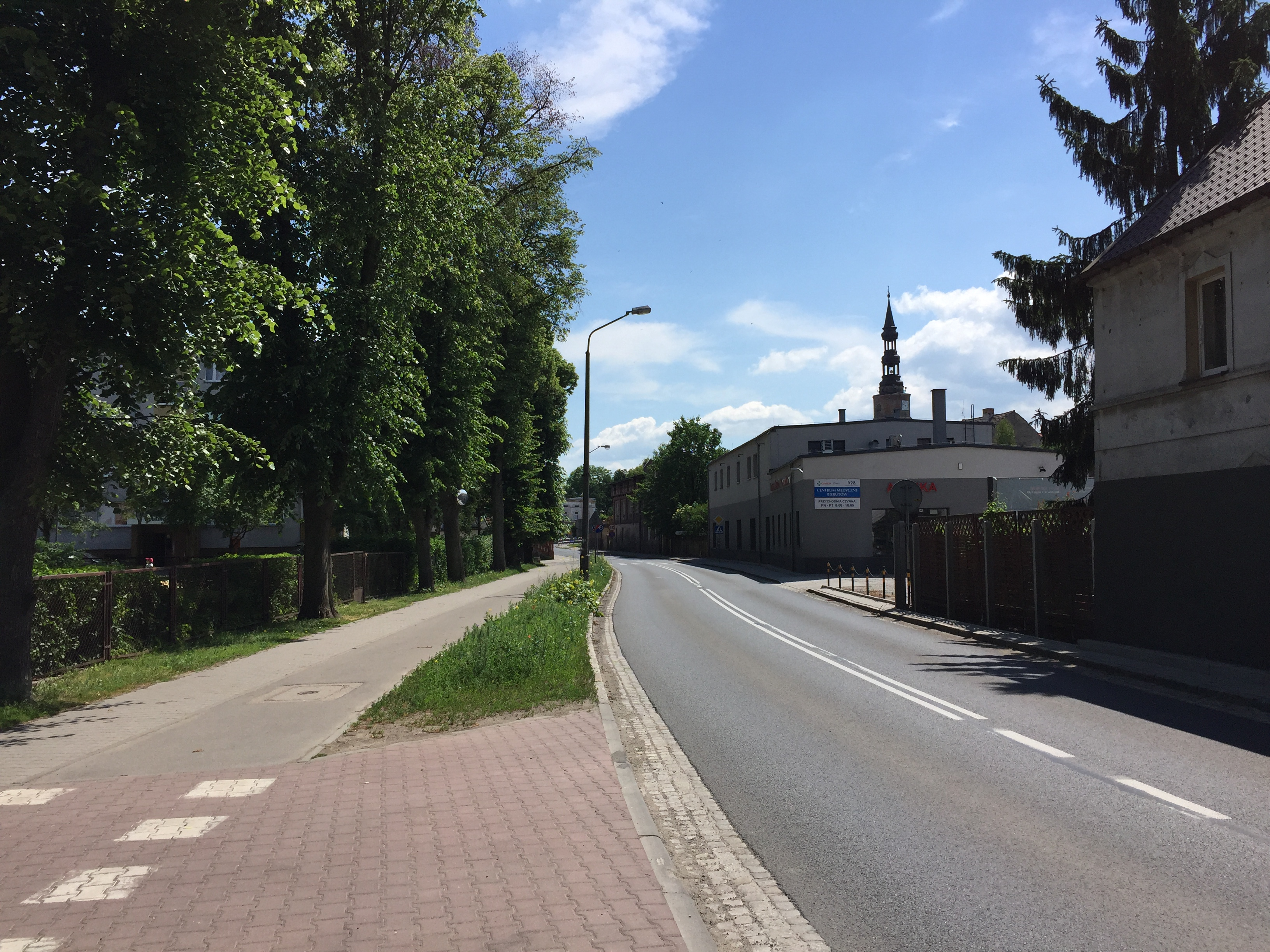 ulica 1 Maja w Bierutowie, w ciągu drogi wojewódzkiej nr 451 (w oddali wieża zamkowa w Bierutowie)